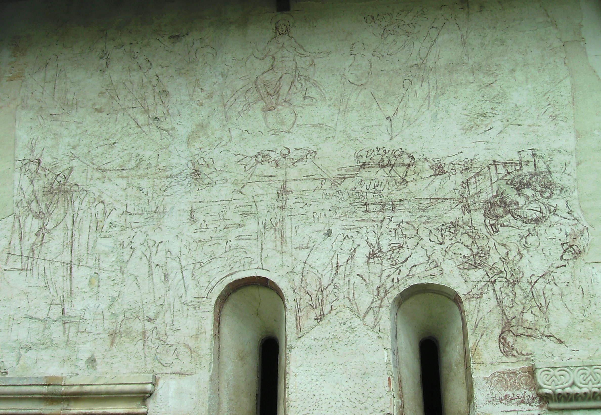 Stiftskirche Millstadt (Kärnten): Weltgerichtsfresko (Vorzeichnung)